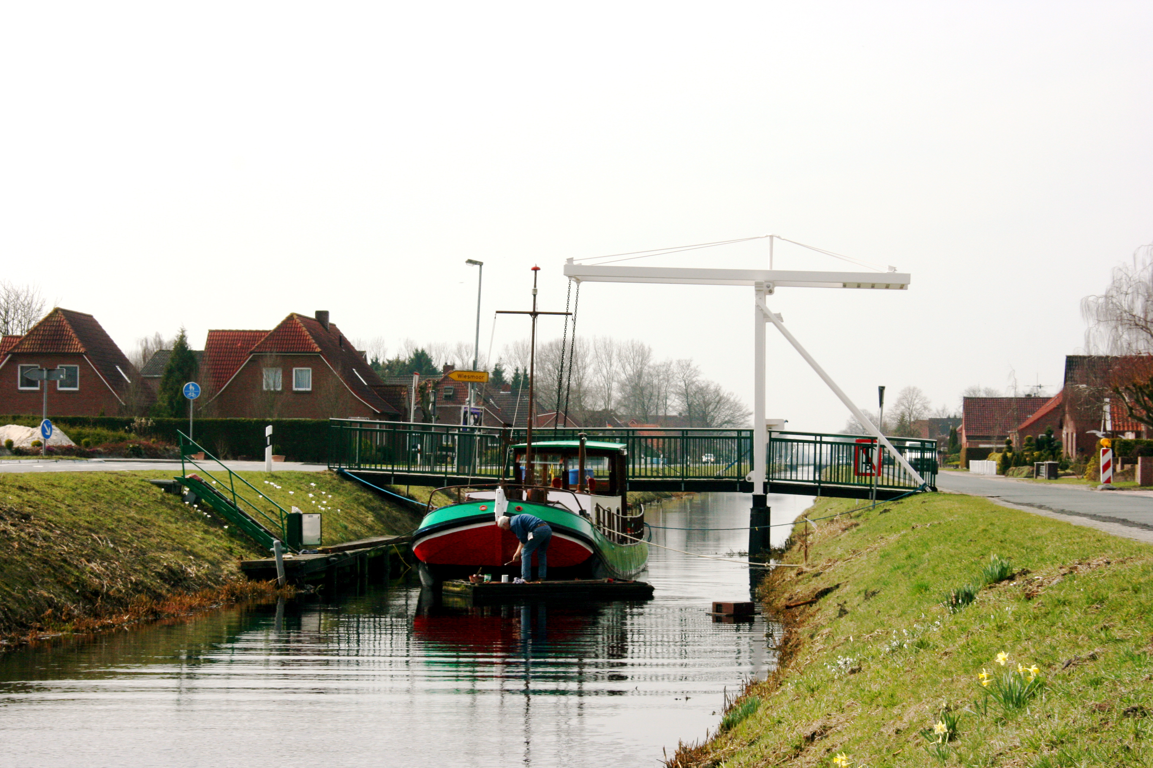 Am Wilhelmsfehnkanal